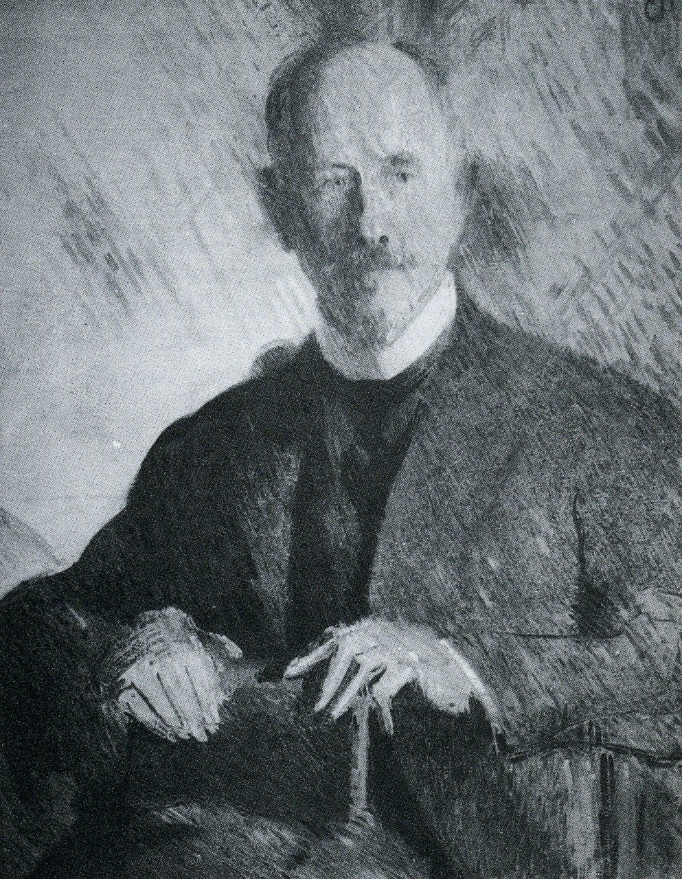 Ölgemälde des Archäologen Paul Herrmann (im Archiv des DAI Berlin)